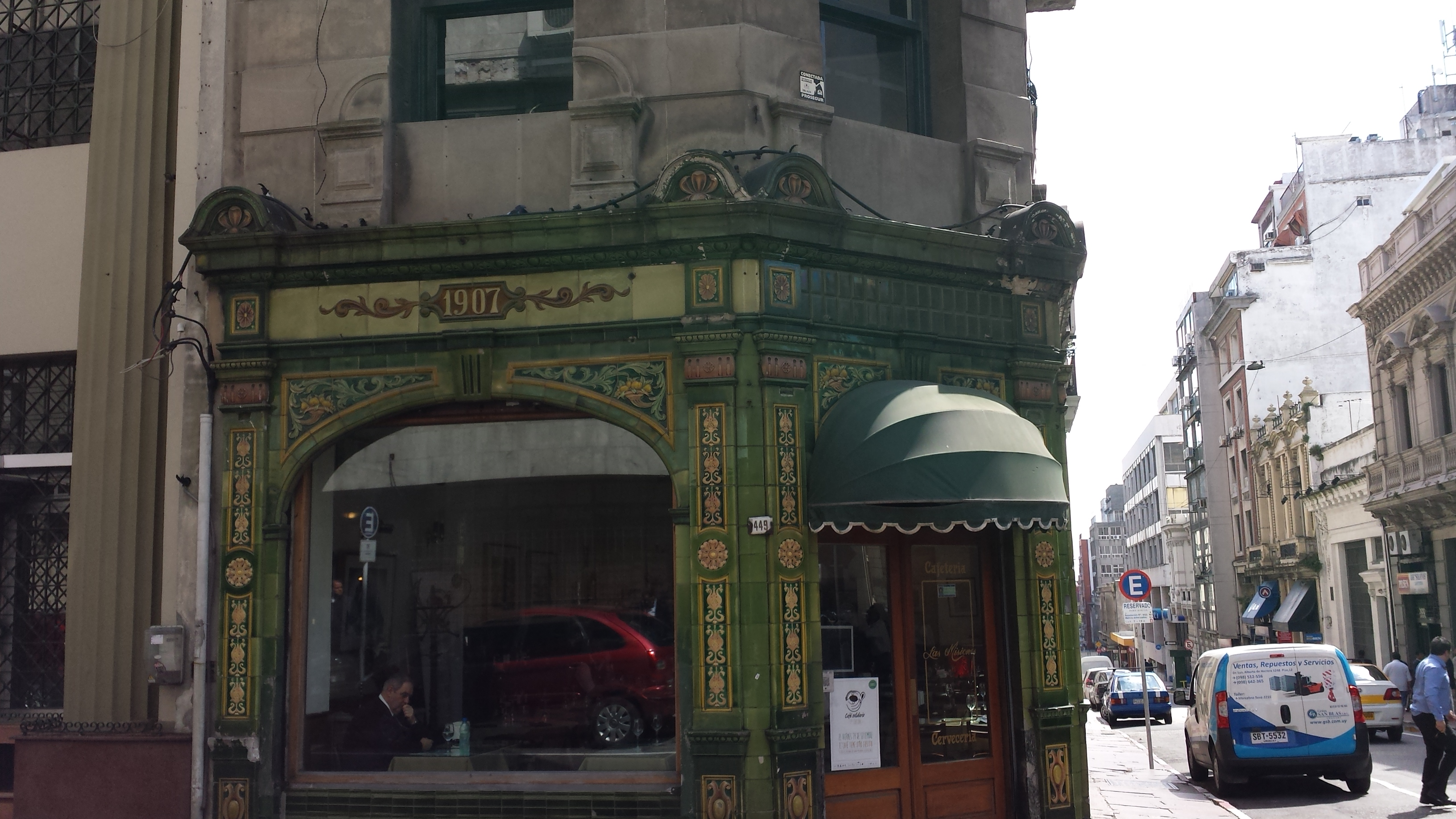 fachada sobre calle 25 de Mayo con mayólicas